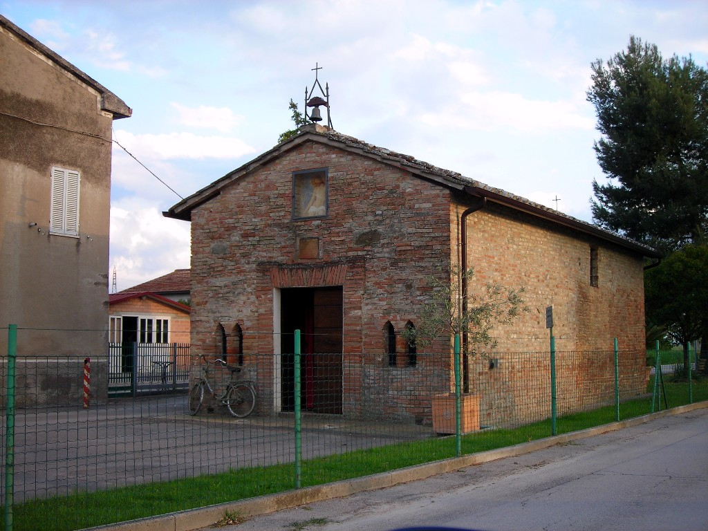 church of Madonna dei Pantanelli in San Nicolo di Celle, Deruta, Perugia, Umbria, Italy